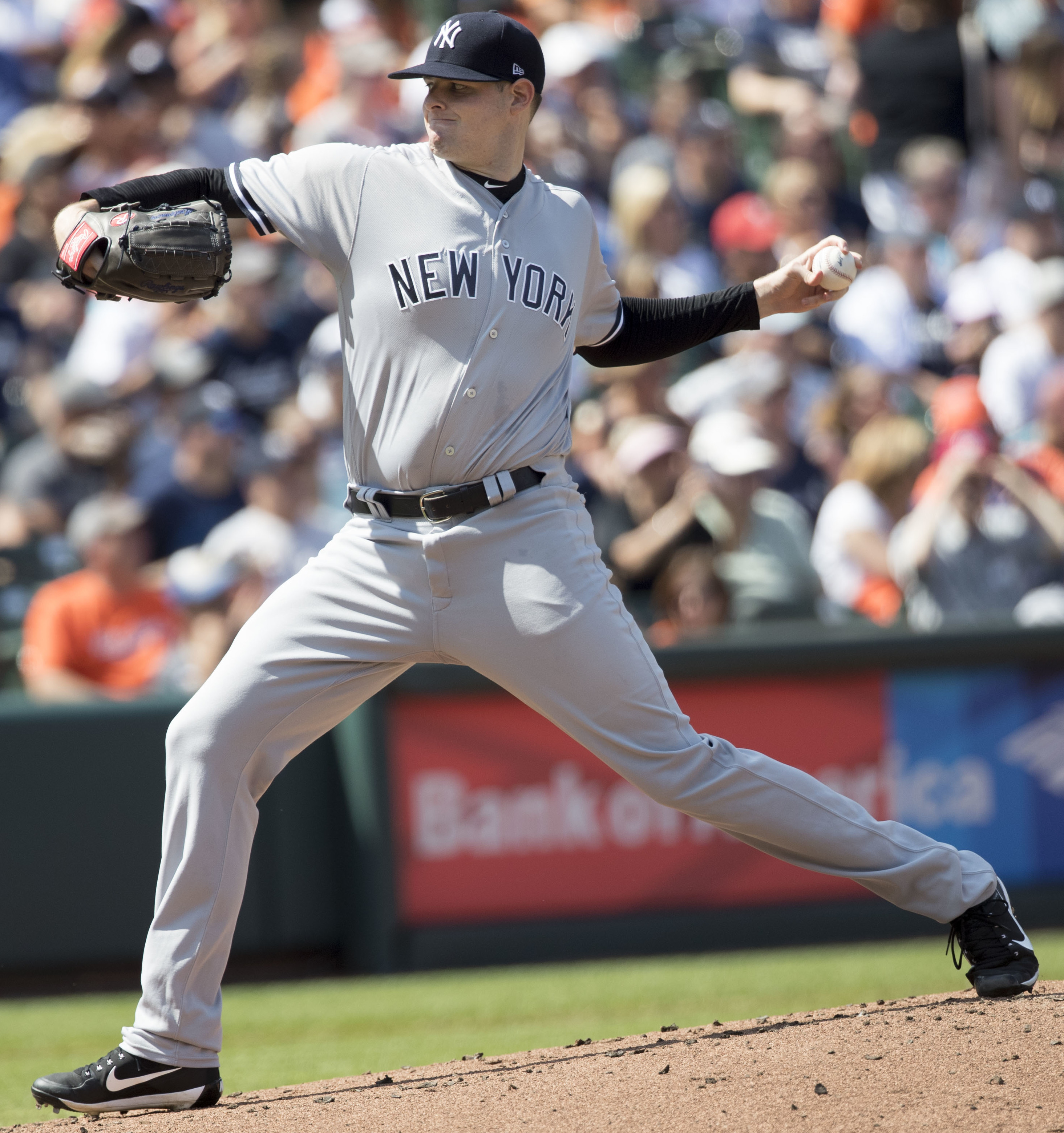 Yankees at Orioles 9/4/17